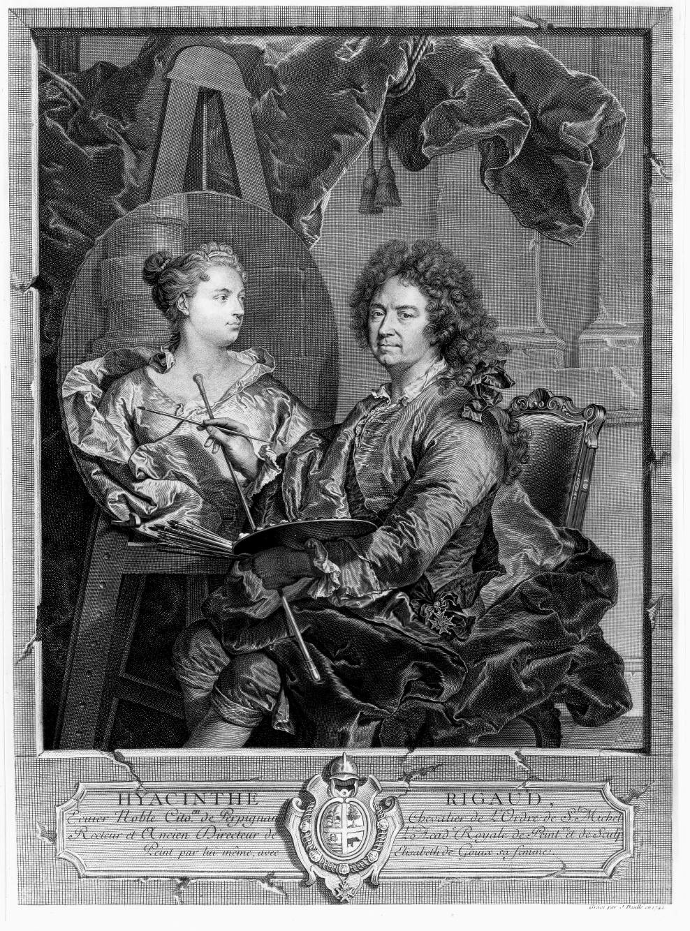 Autoportrait de Hyacinthe Rigaud peignant sa femme